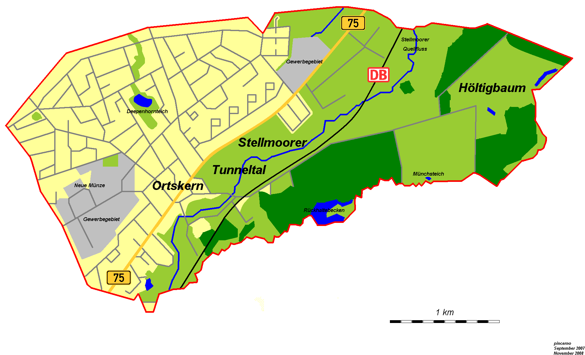 Karte des Quartiers Meiendorf, das zum Stadtteil Rahlstedt im Bezirk Wandsbek von Hamburg gehört.